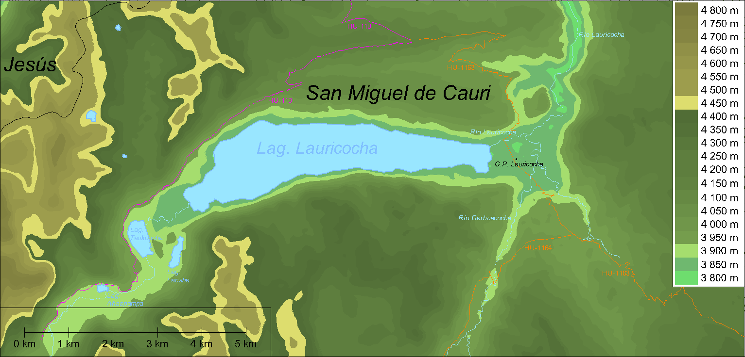 Mapa físico del alrededor de la laguna Lauricocha.